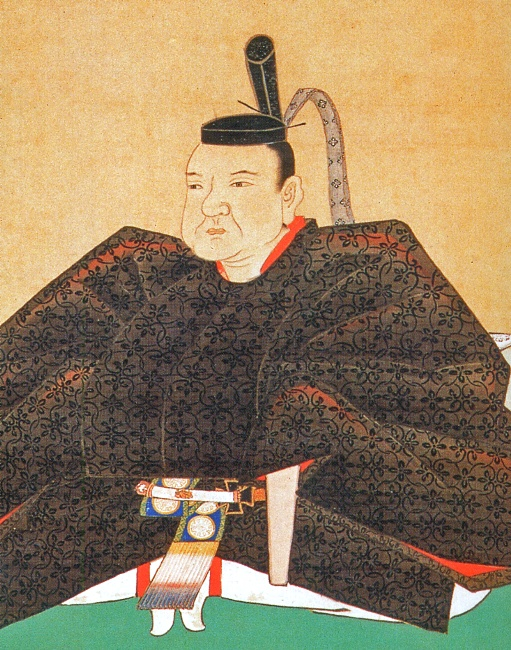 仙台藩第3代藩主伊達綱宗